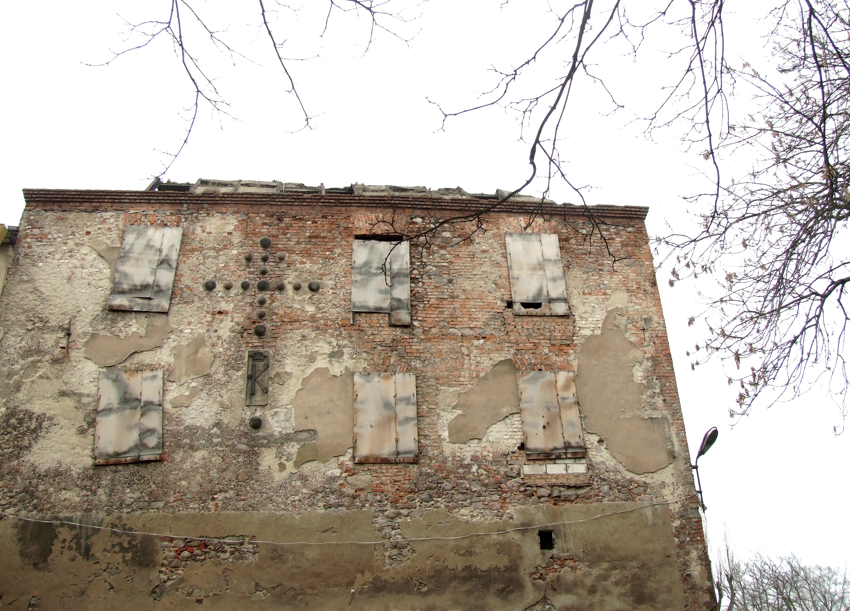 Zamek w Świebodzinie (fragment) Autor: Mohylek 18:10, 8 March 2007 (UTC)